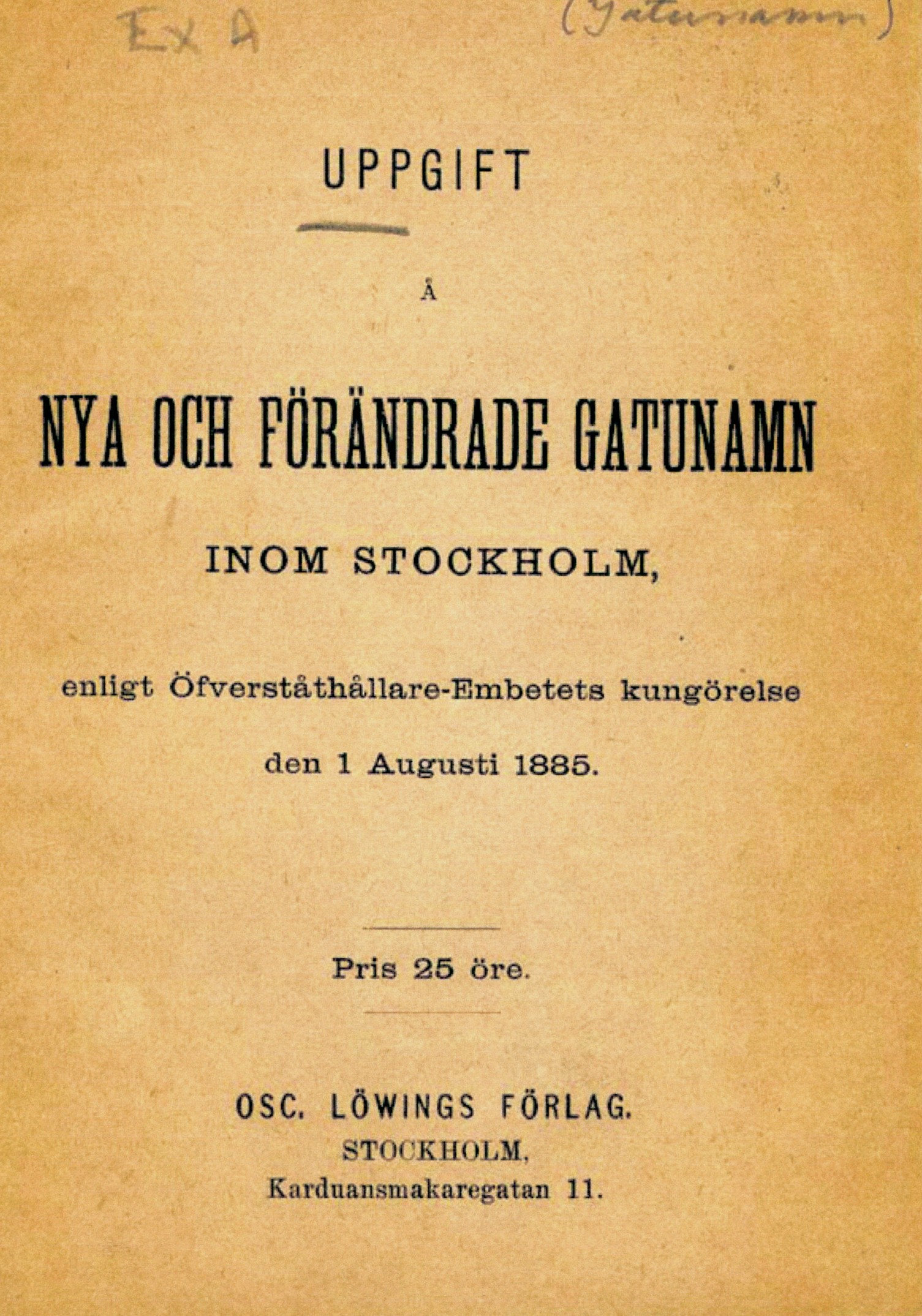 "Uppgift å nya och förändrade gatunamn inom Stockholm enligt Överståthållare-embetets kungörelse den 1 augusti 1885"